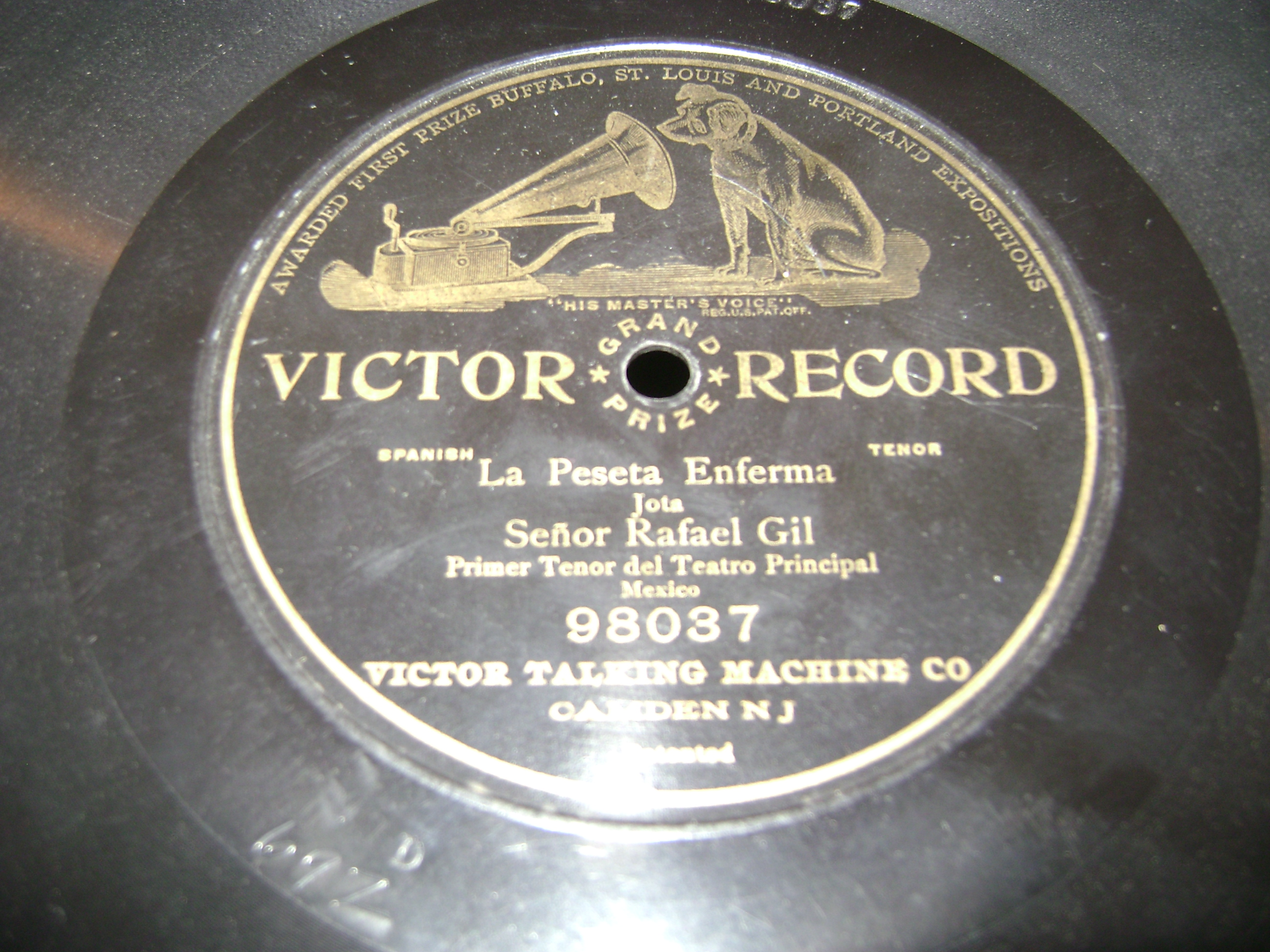 etiqueta de una grabación centenaria, hecho en Camden, New Jersey